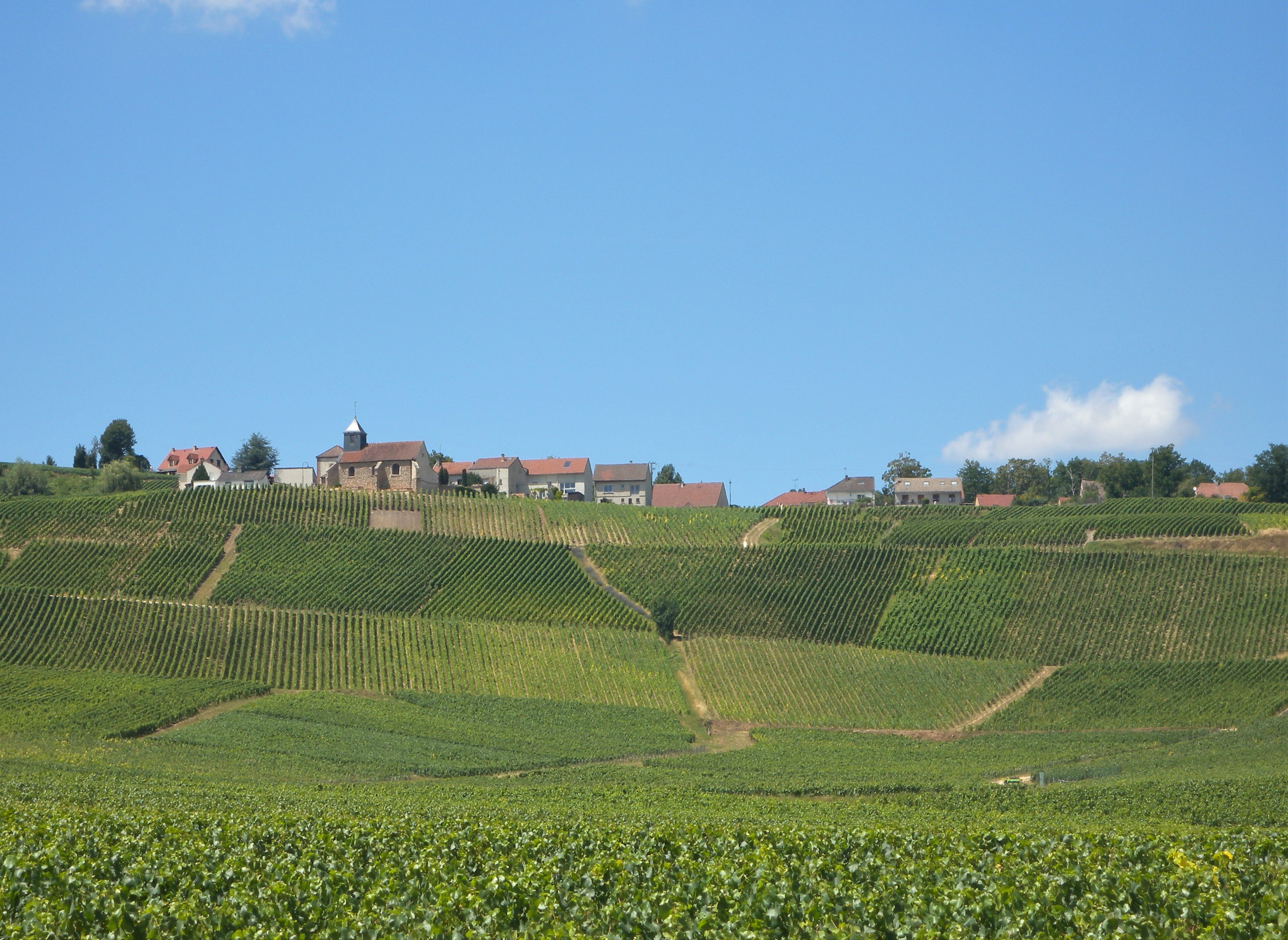 Mutigny, village et vignoble en juillet 2020.